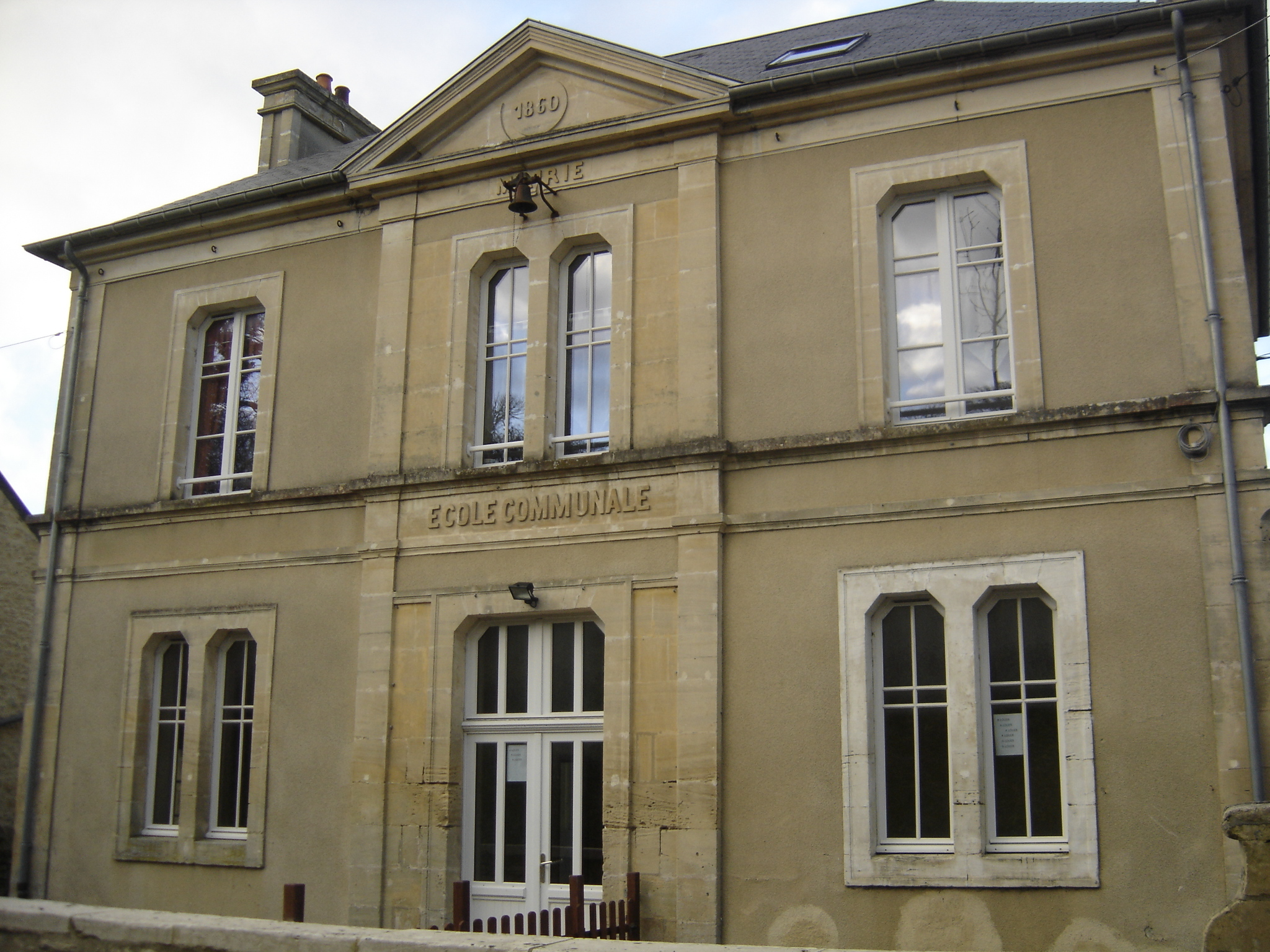 mairie, école communale édifiée en 1860